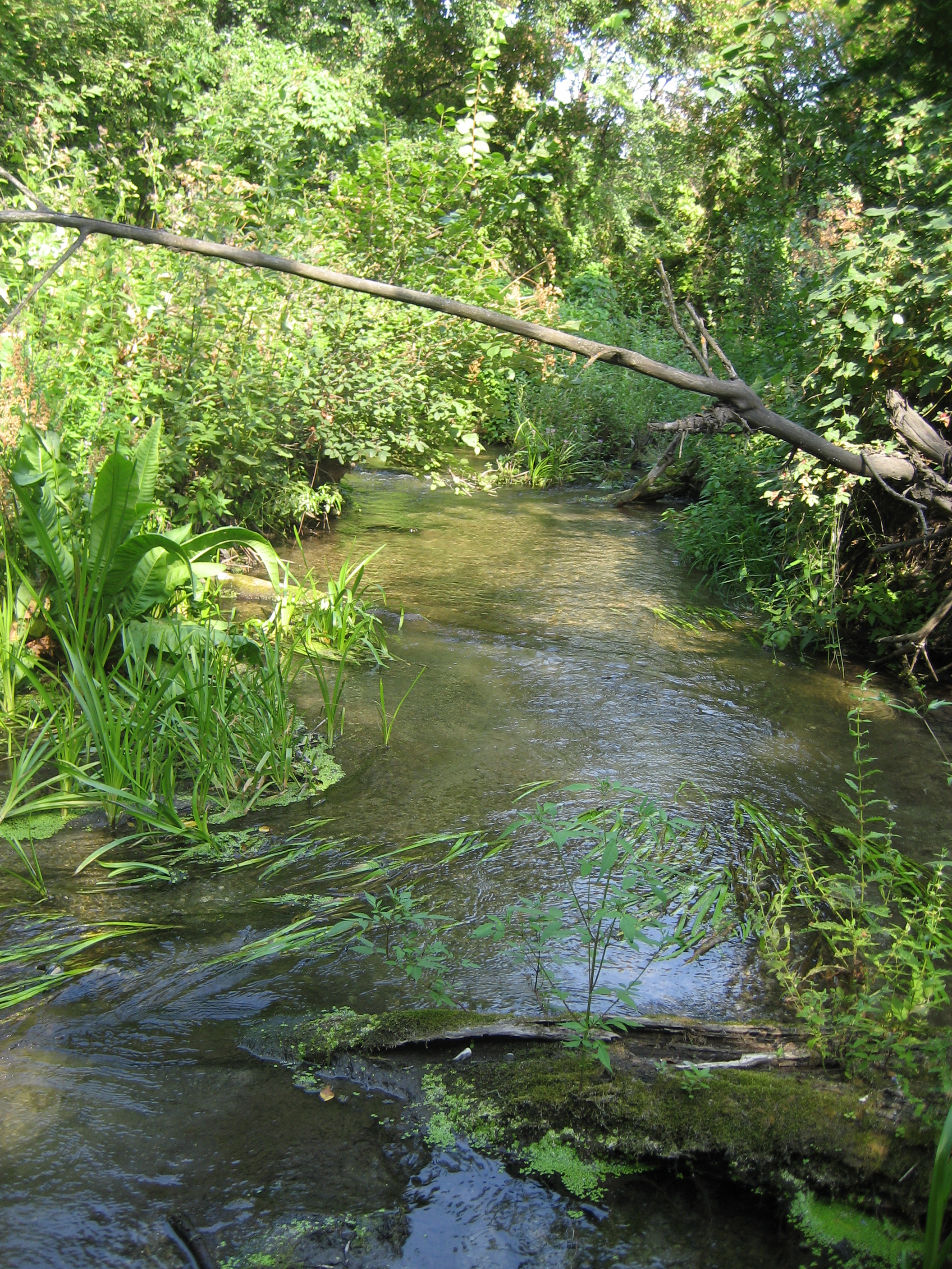 Прибрежная растительность речки Гусихи, притока Терешки (у с. Кряжим, Вольский район, Саратовская область).jpg